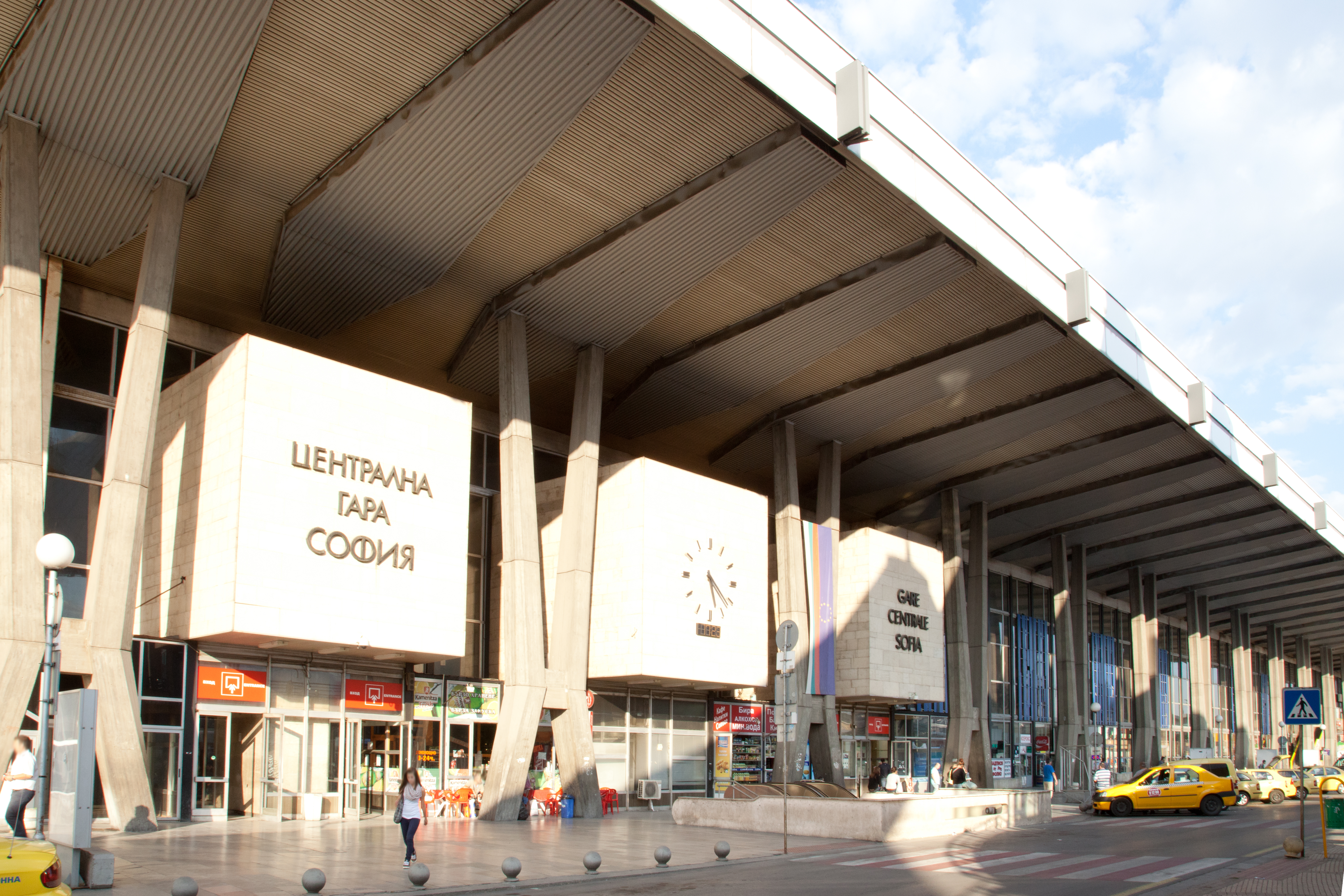 Sofia , Hauptbahnhof